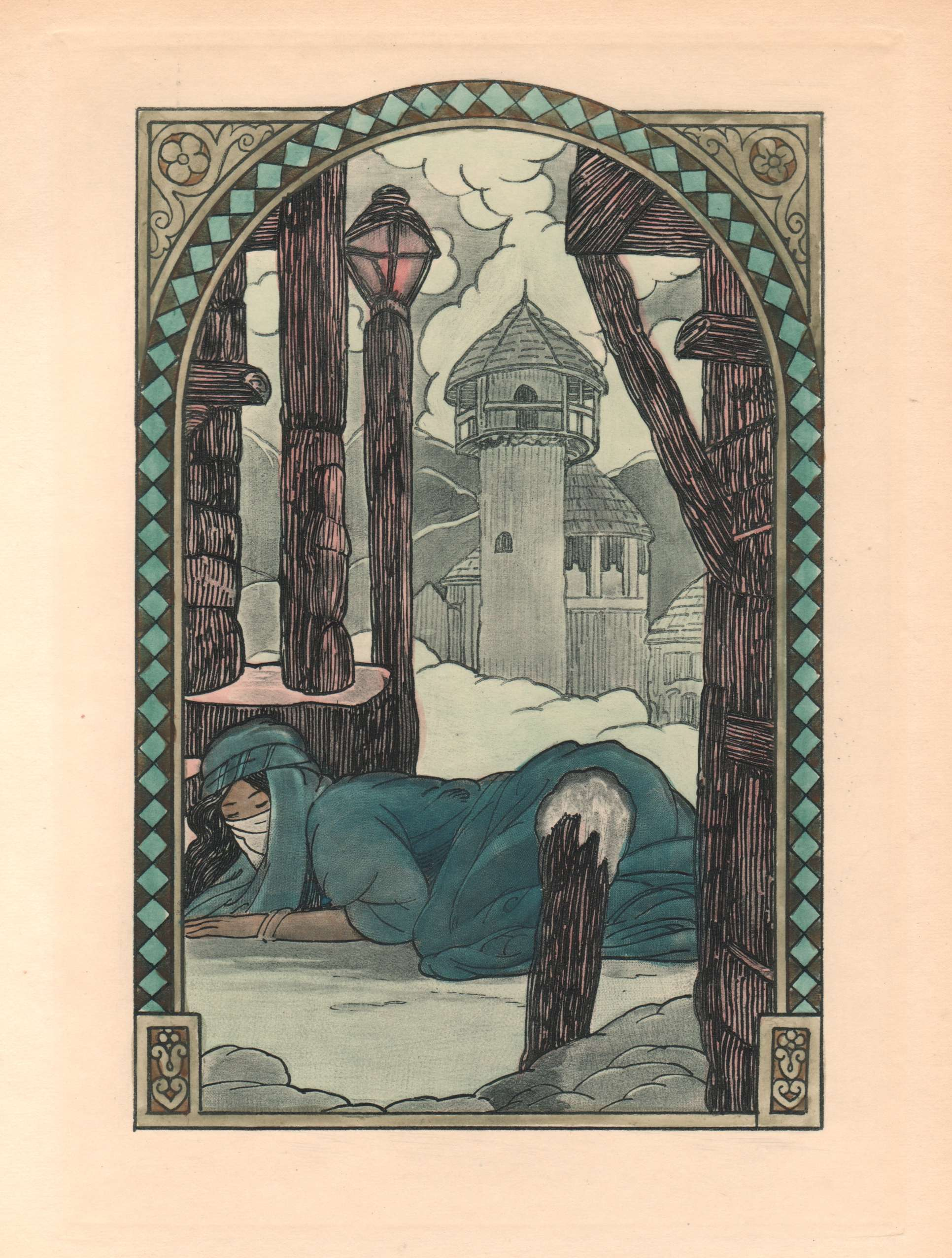 Hors-texte de la première nouvelle, La danseuse de shamakha, du livre Nouvelles asiatiques de Joseph Arthur de Gobineau, Paris, éditions Crès 1924Illustration placée en tête de la nouvelle : La Danseuse de Shamakha